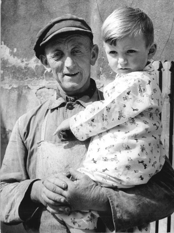 Bornstedt, Einzelbauer mit Enkel Zentralbild Biscan 24.4.1957 Gemeinde Bornstedt vor der Wahl Bornstedt ist eine kleine Gemeinde im Kreis Waldensleben. Die Bornstedter verstehen aber ihre Sache. Sie haben die landwirtschaftliche Produktion derart entwickelt, dass sie schon wiederholt Kreissieger geworden sind und eine ganze Reihe Auszeichnungen und Prämien erhalten haben. Einer der Einzelbauern kann als besonderen Beitrag zu den Wahlvorbereitungen schon die hundertprozentige Erfüllung seines Solls in tierischer Produktion melden. UBz: Der werktätige Einzelbauer Otto Schalk ist Mitglied des Gemeindekirchenrates und Vorsitzender der VdgB (BHG). Er ist einer der besten Bauern des Ortes. "Am 23.Juni werde ich meine Stimme natürlich für die Kandidaten der Nationalen Front abgeben", erklärt er. (Schalk mit seinem Enkel Jürgen).